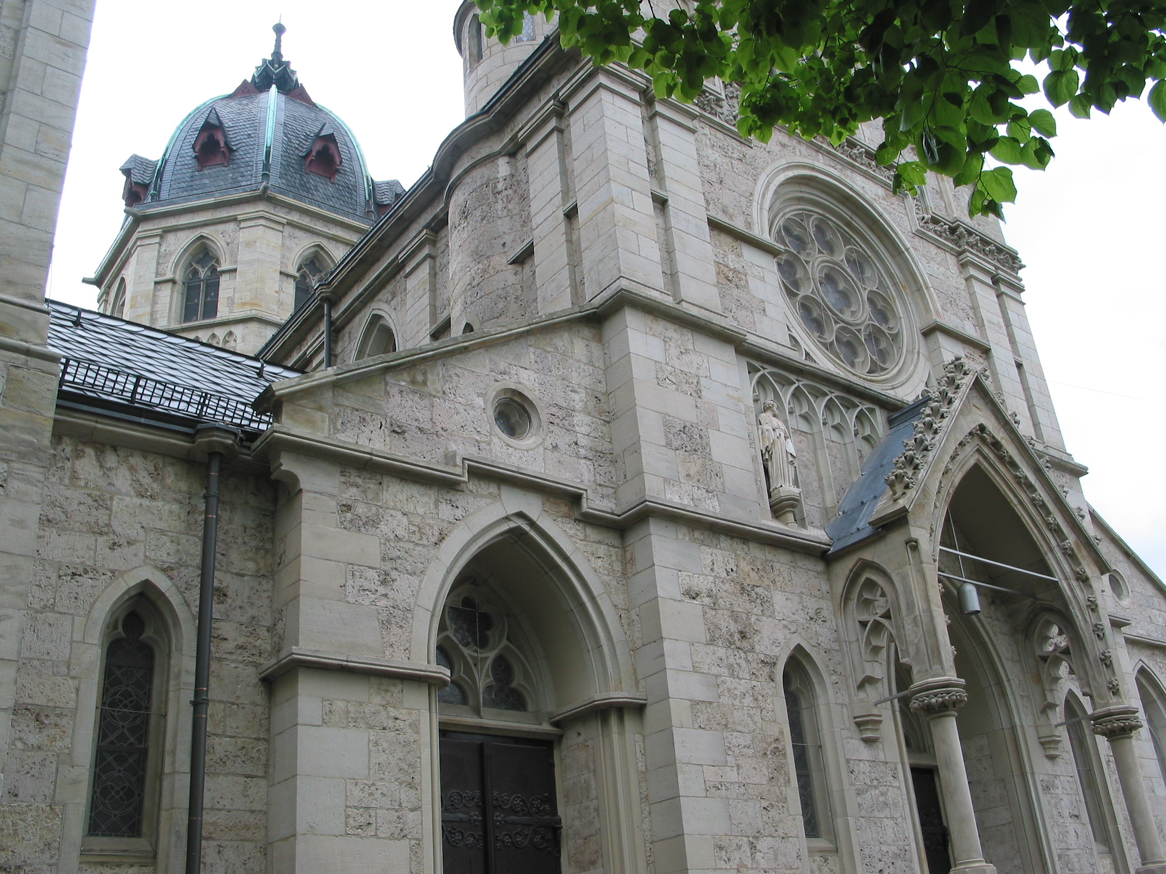 Ostansicht der Herz Jesu Kirche in Weimar.